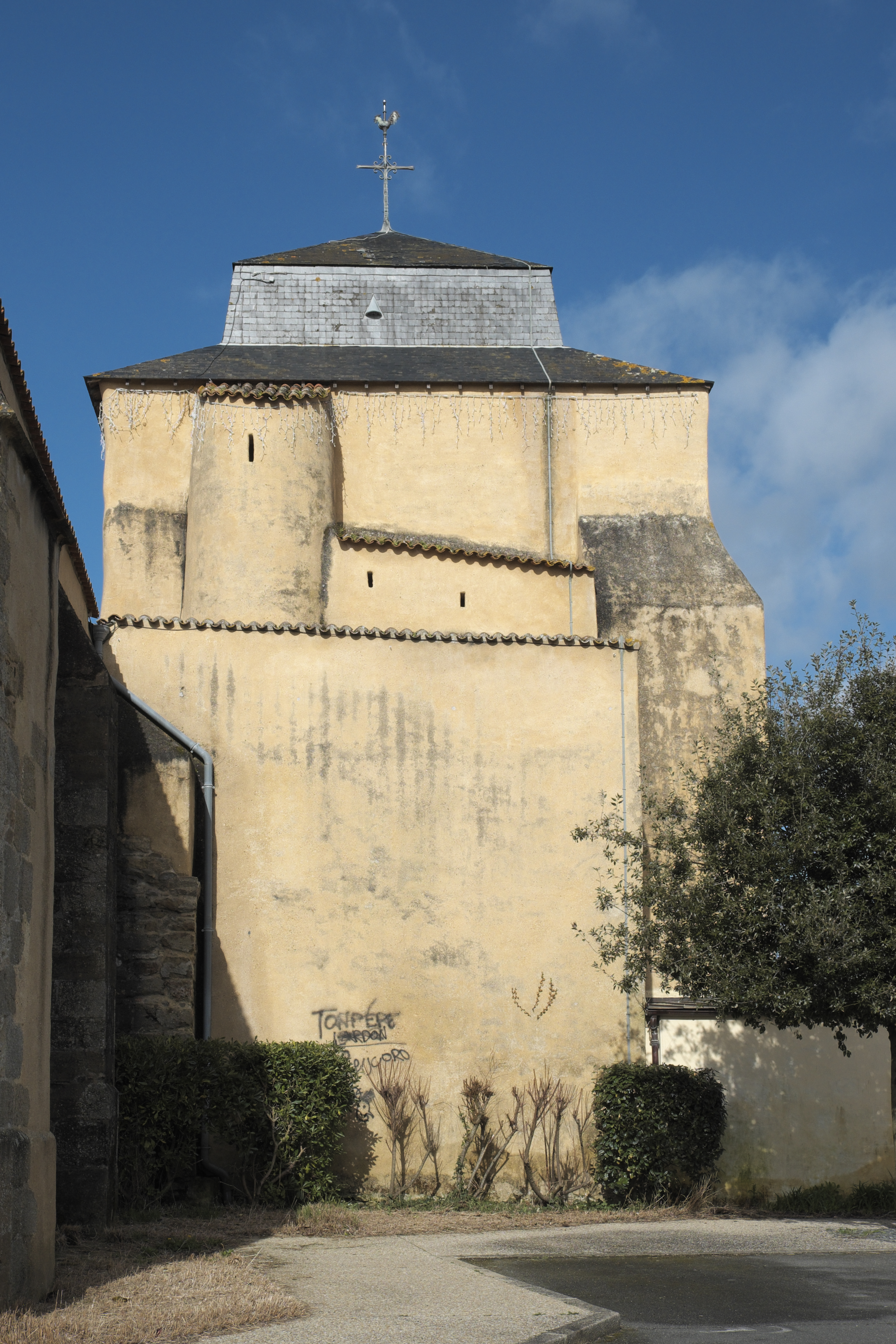 Katholische Pfarrkirche Saint-Vincent in Saint-Vincent-sur-Jard im Département Vendée (Pays de la Loire/Frankreich)